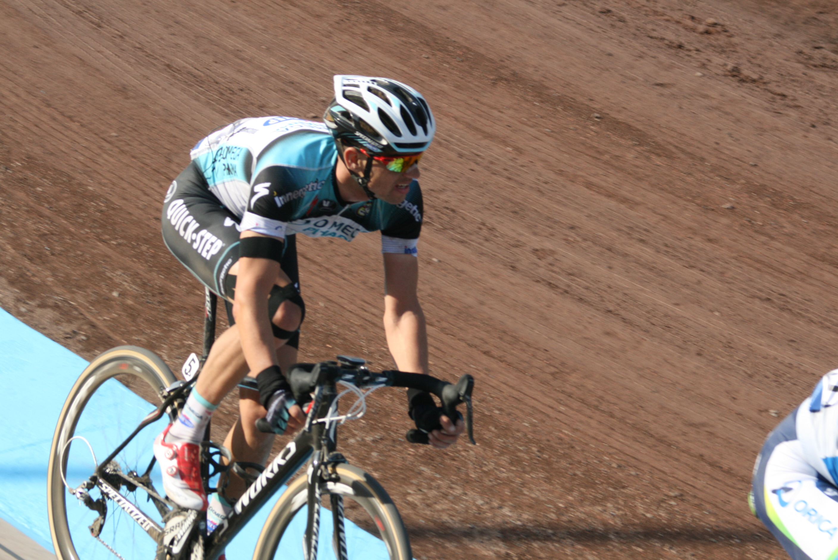 Paris-Roubaix 2013, vélodrome de Roubaix Zdeněk Štybar